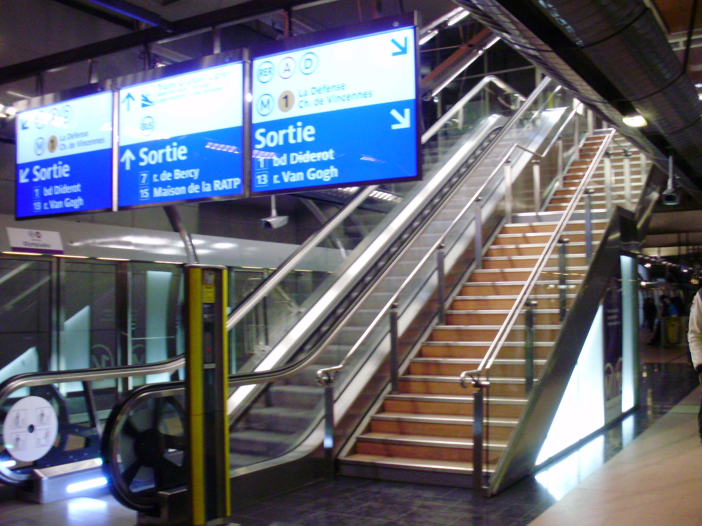 Station de métro Gare de Lyon, ligne 14, Paris 12e, France : sortie au mileu du quai, créée le 16 décembre 2011